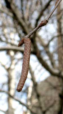 Gray Birch.